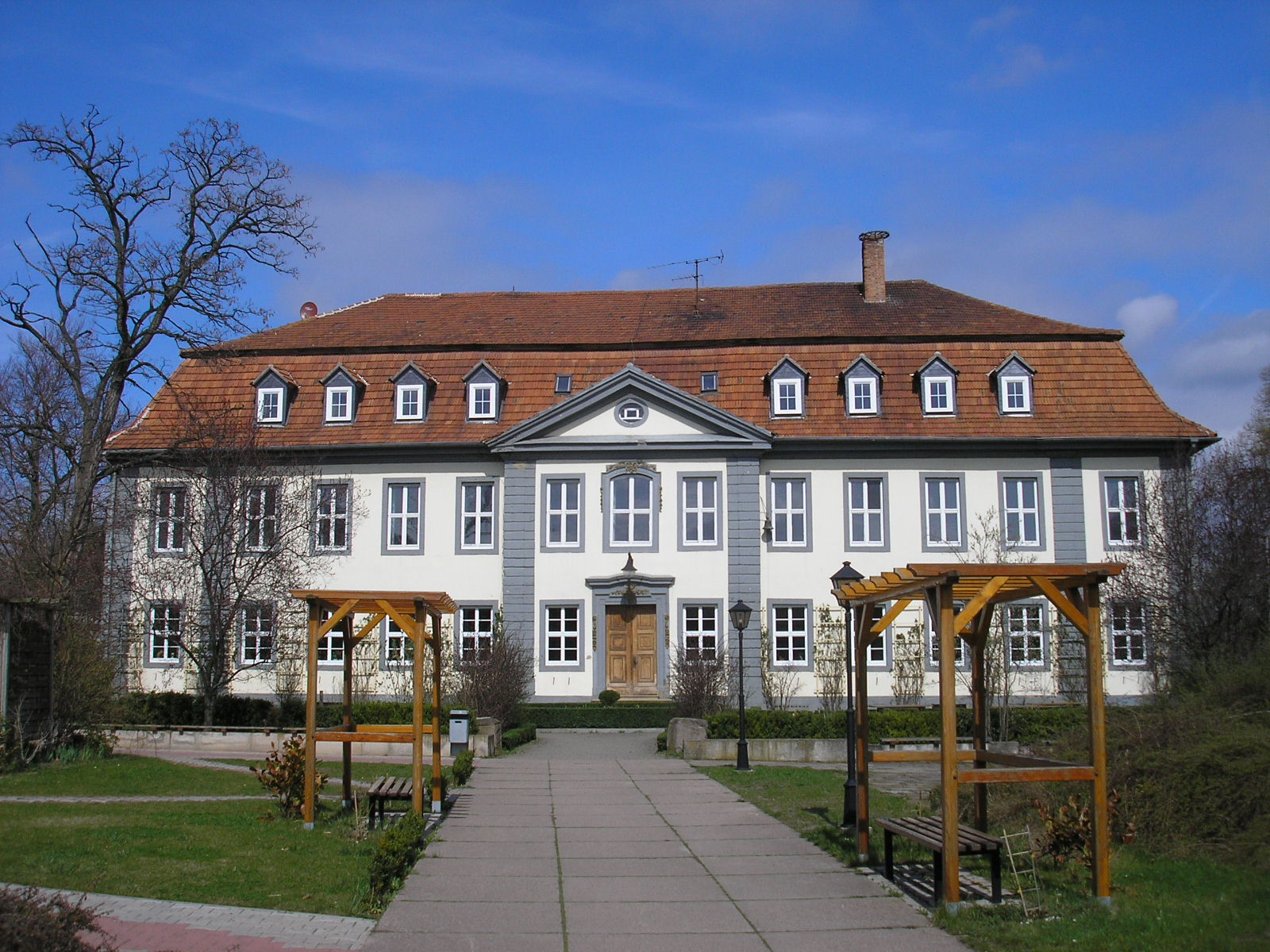 Das hintere Gebäude der Schlossanlage in Gebesee (Thüringen).